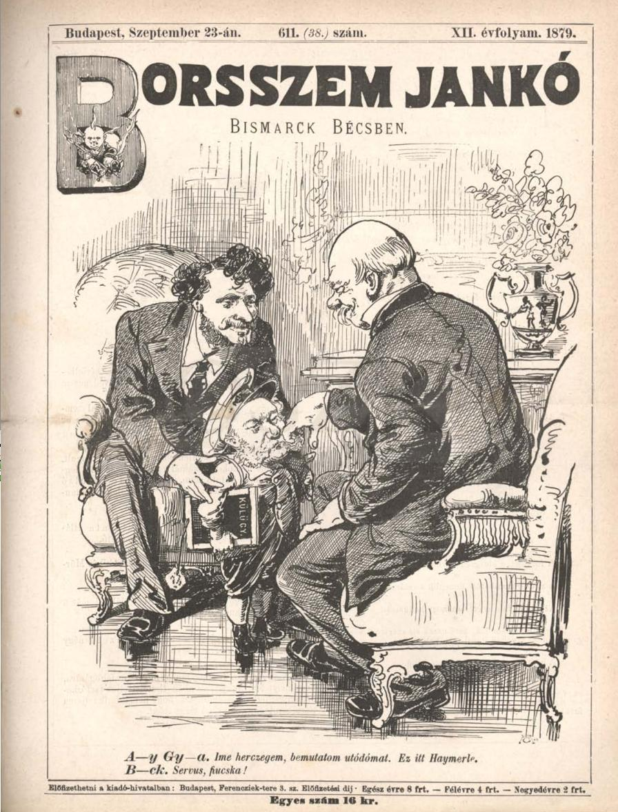 A Borsszem Jankó élclap karikatúrája Otto von Bismarck német kancellárról, Id. Andrássy Gyuláról és Heinrich Karl von Haymerle báróról Bismarck bécsi látogatása alkalmából, amikor a külügyek képviseletéről lemondott Andrássyval és utódjával diplomáciai tárgyalásokat folytatott a Balkánról